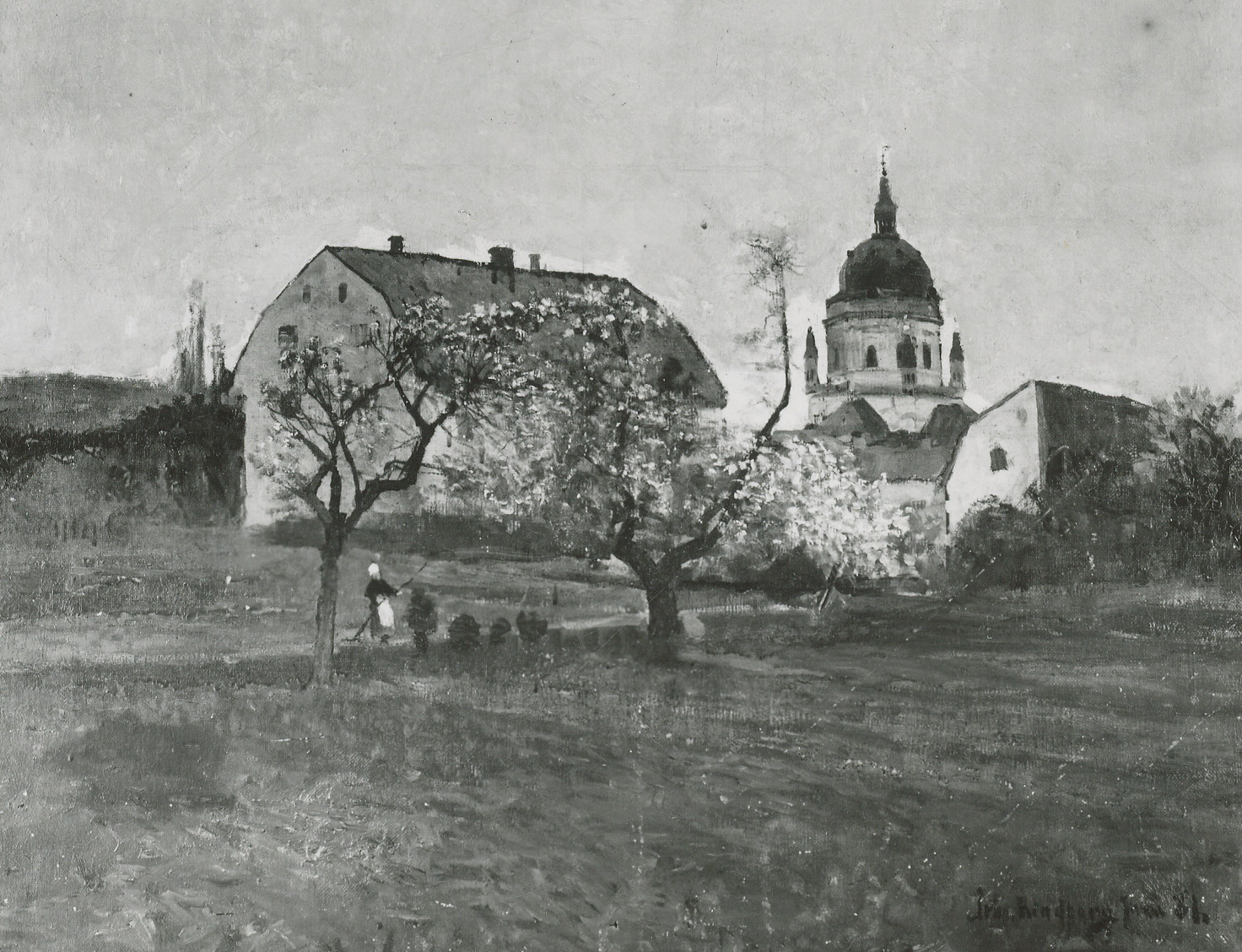 Motiv från Björns trädgård med Katarina kyrka i bakgrunden